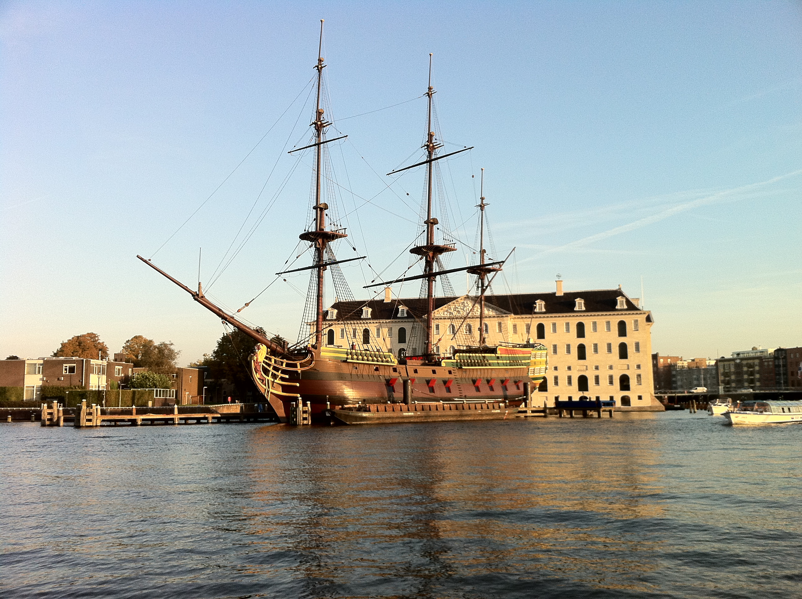 Admiraliteitszeemagazijn. Enorm, geheel in het water liggend pakhuis (1656-'57 door Daniel Stalpaert, Grote brand in 1791, daarna hersteld).